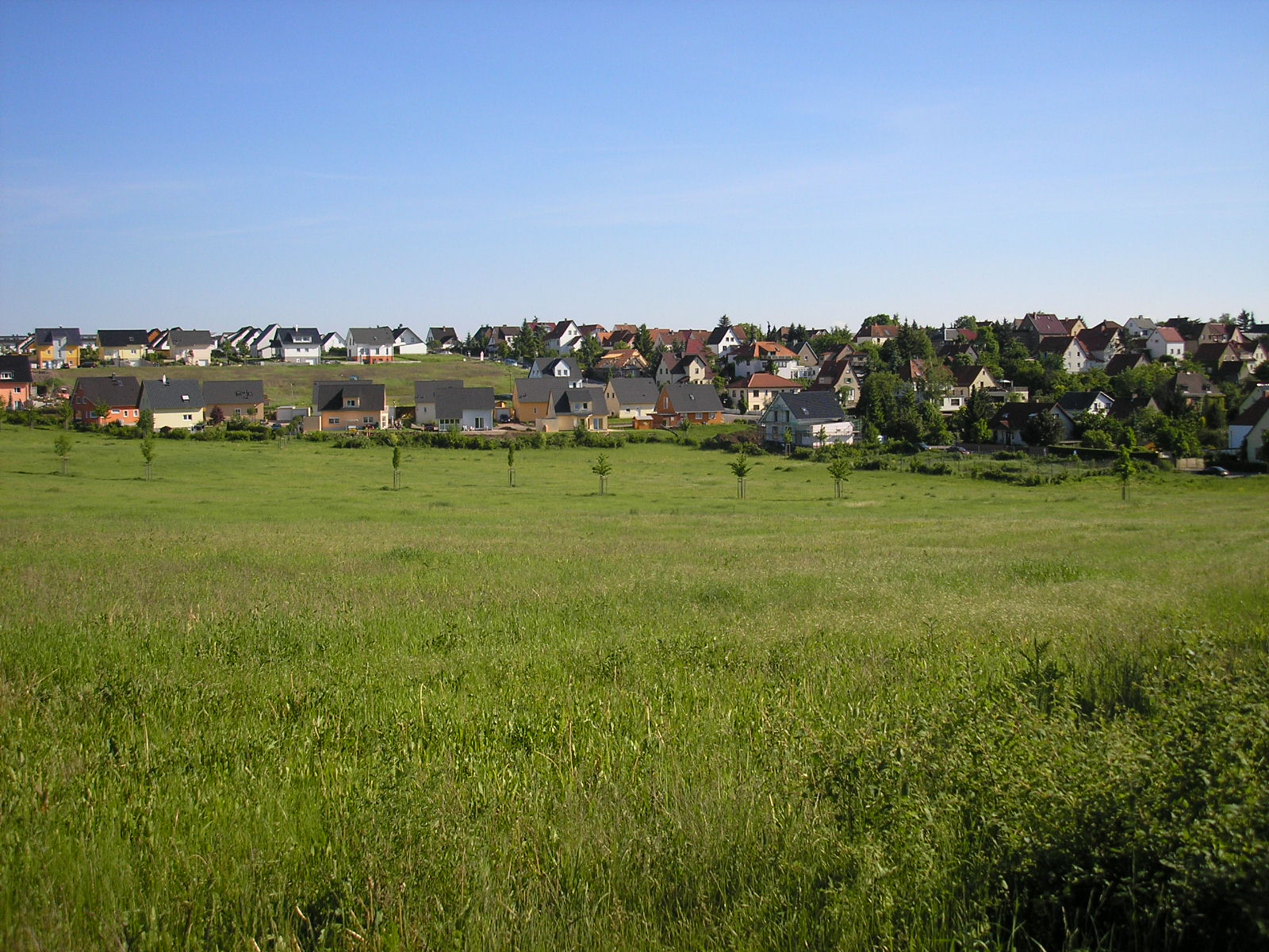 Die Ringelbergsiedlung (links neuer Teil, rechts alter Teil) in Erfurt.